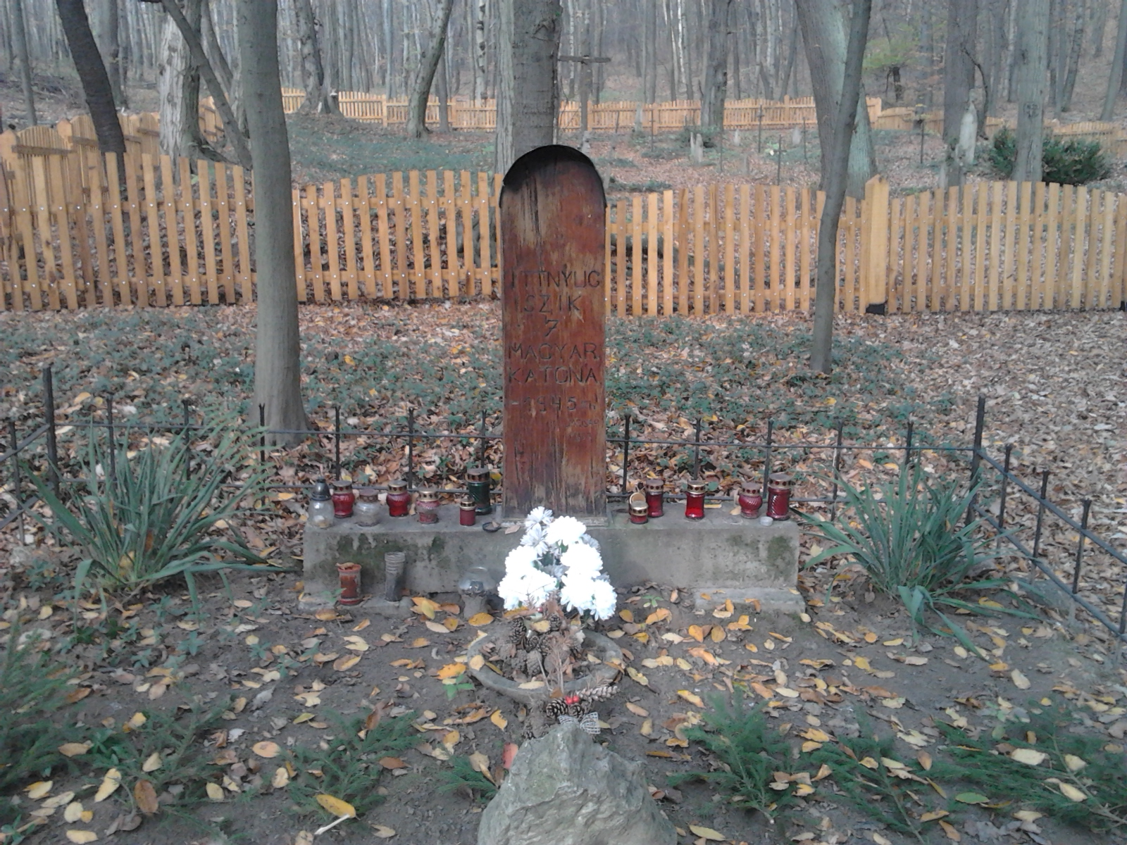 Hét magyar katona sírja a körtvélyespusztai egykori temető maradványainál.